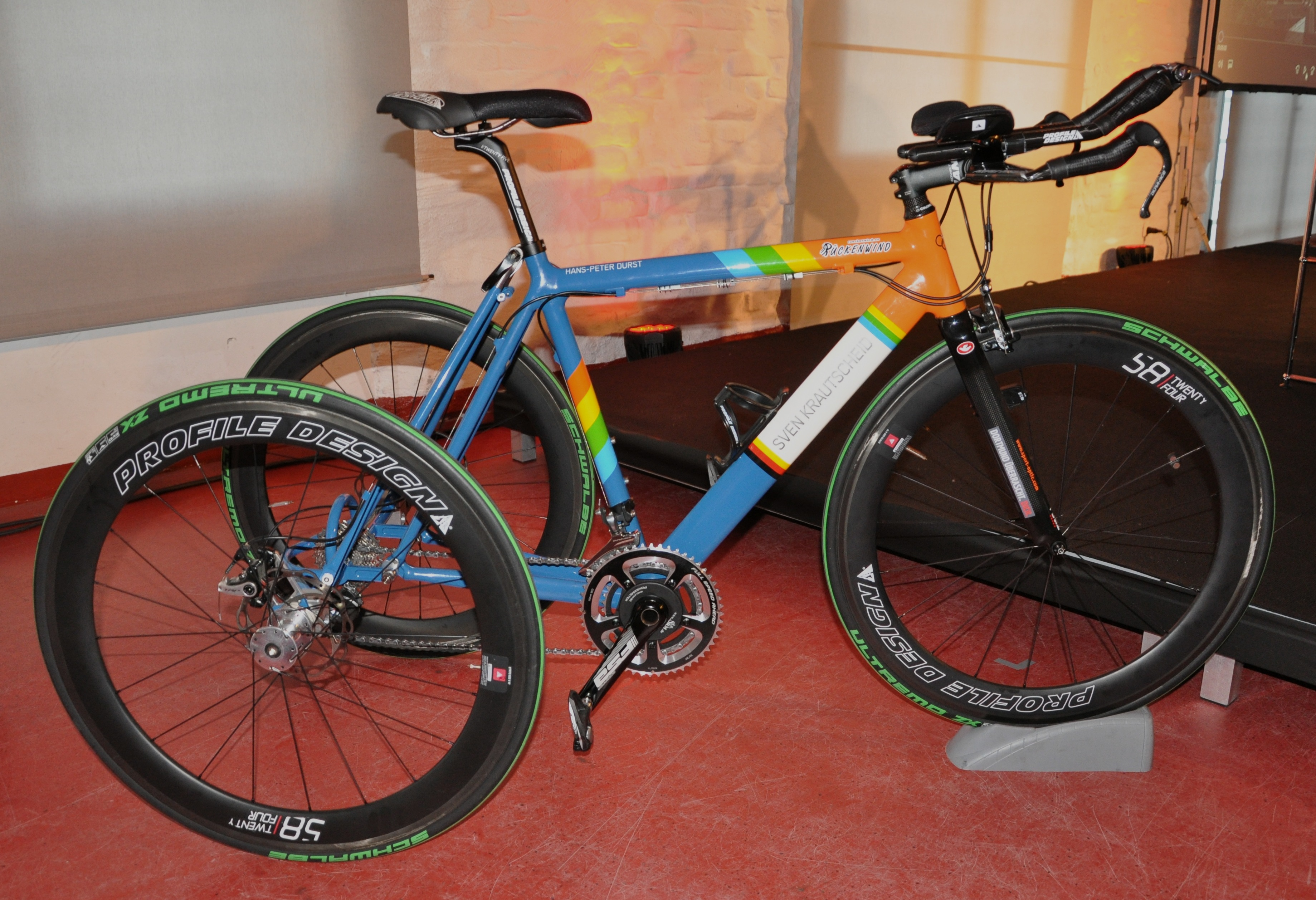 Renn-Dreirad von Hans-Peter Durst für die Paralymics 2016 in Rio de Janeiro